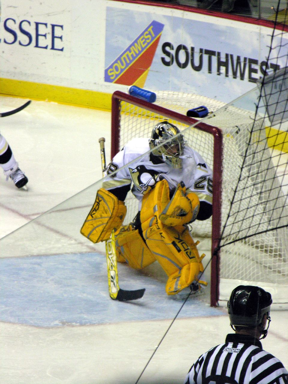 Marc-Andre Fleury